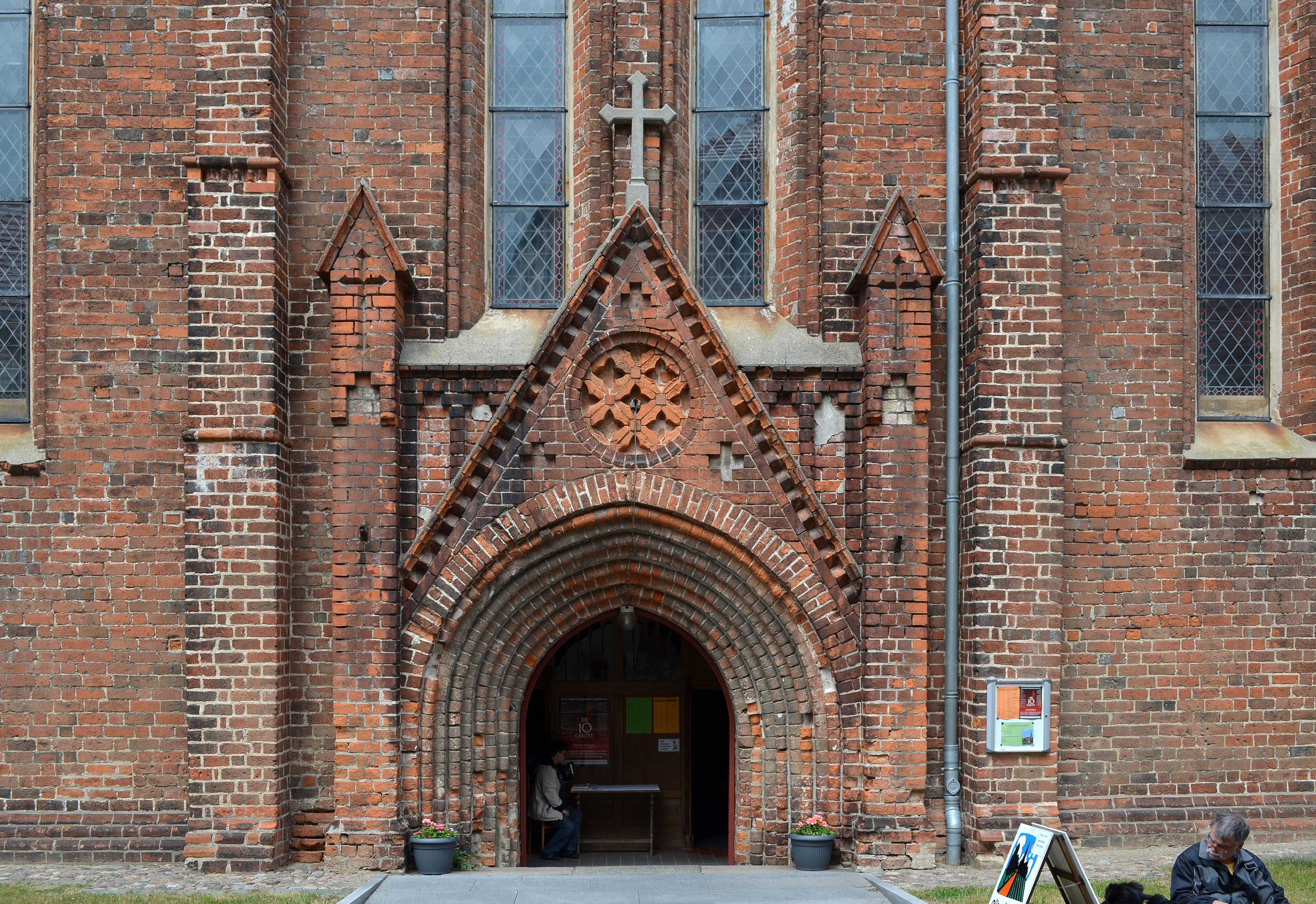 Röbel Nicolaikirche Eingangsportal 2